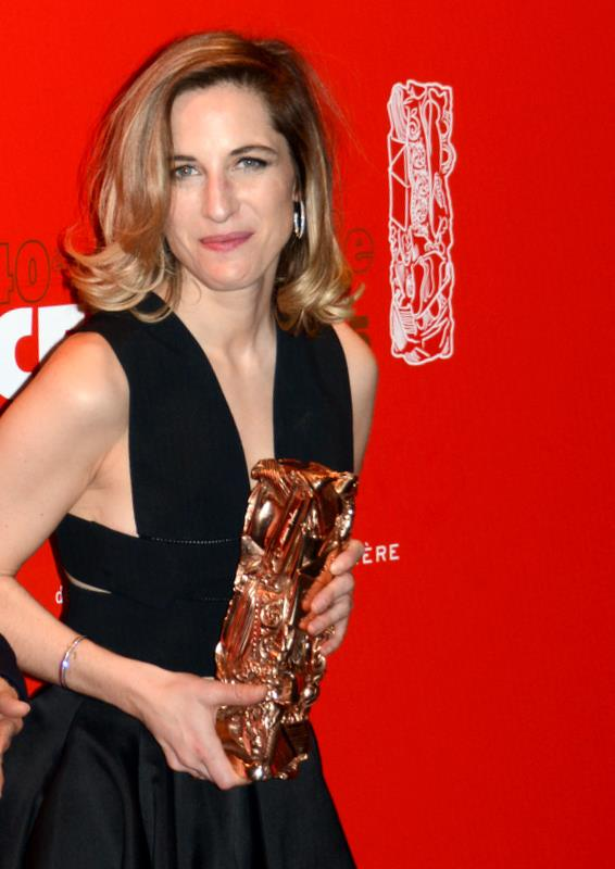 Nancy Grant à la cérémonie des César